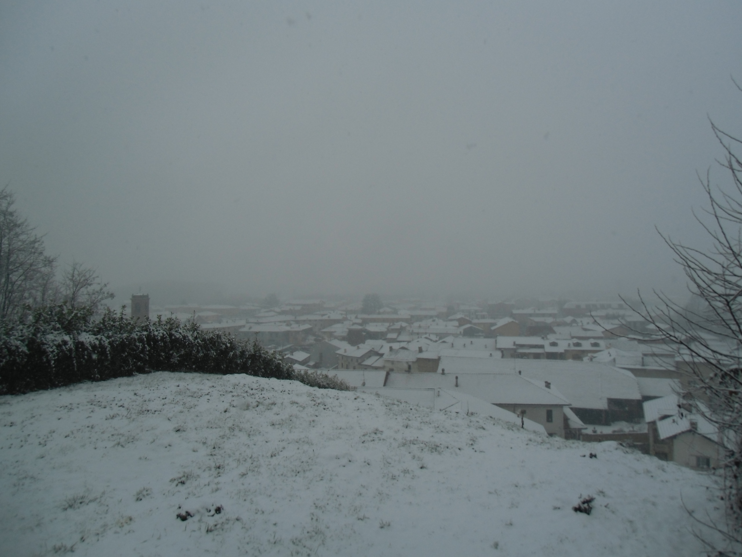 Veduta invernale dalla collina sopra Briona